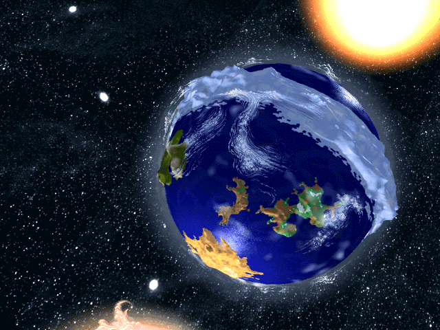 Capture d'écran du jeu vidéo Little Big Adventure (1994), développé par Adeline Software International.